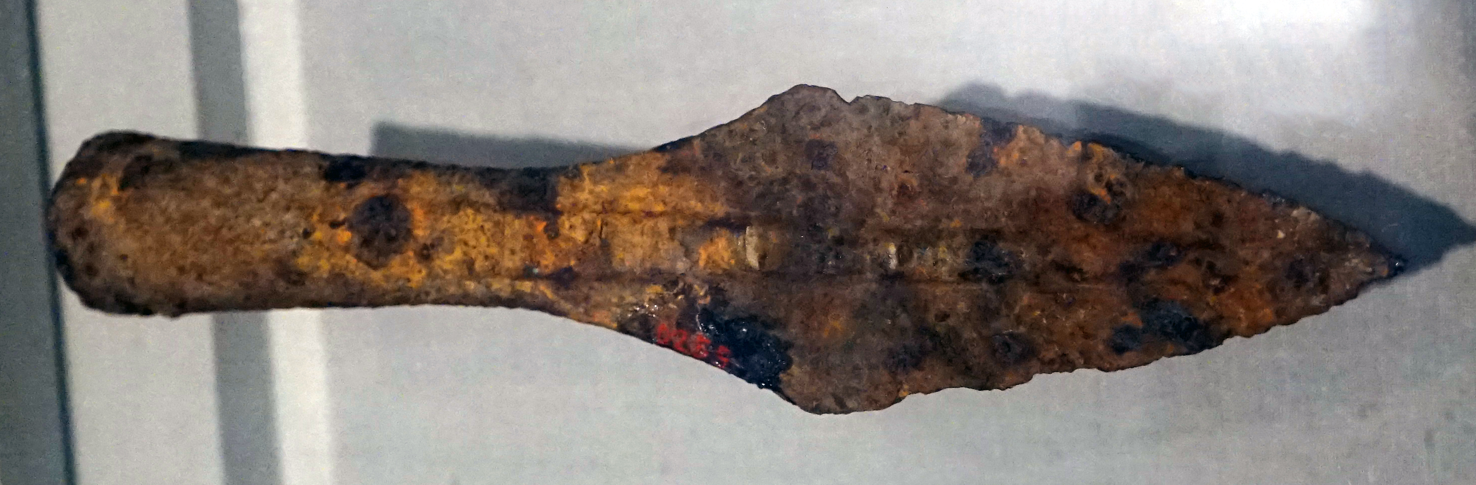 圆脊铁矛头 清 爱辉区爱辉镇陈连春捐赠 一级文物